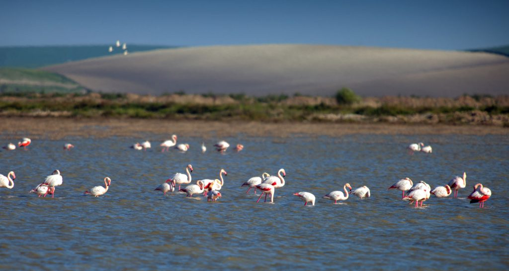 Flamencos en la Reserva Ecologica de Esteros del Guadalquivir